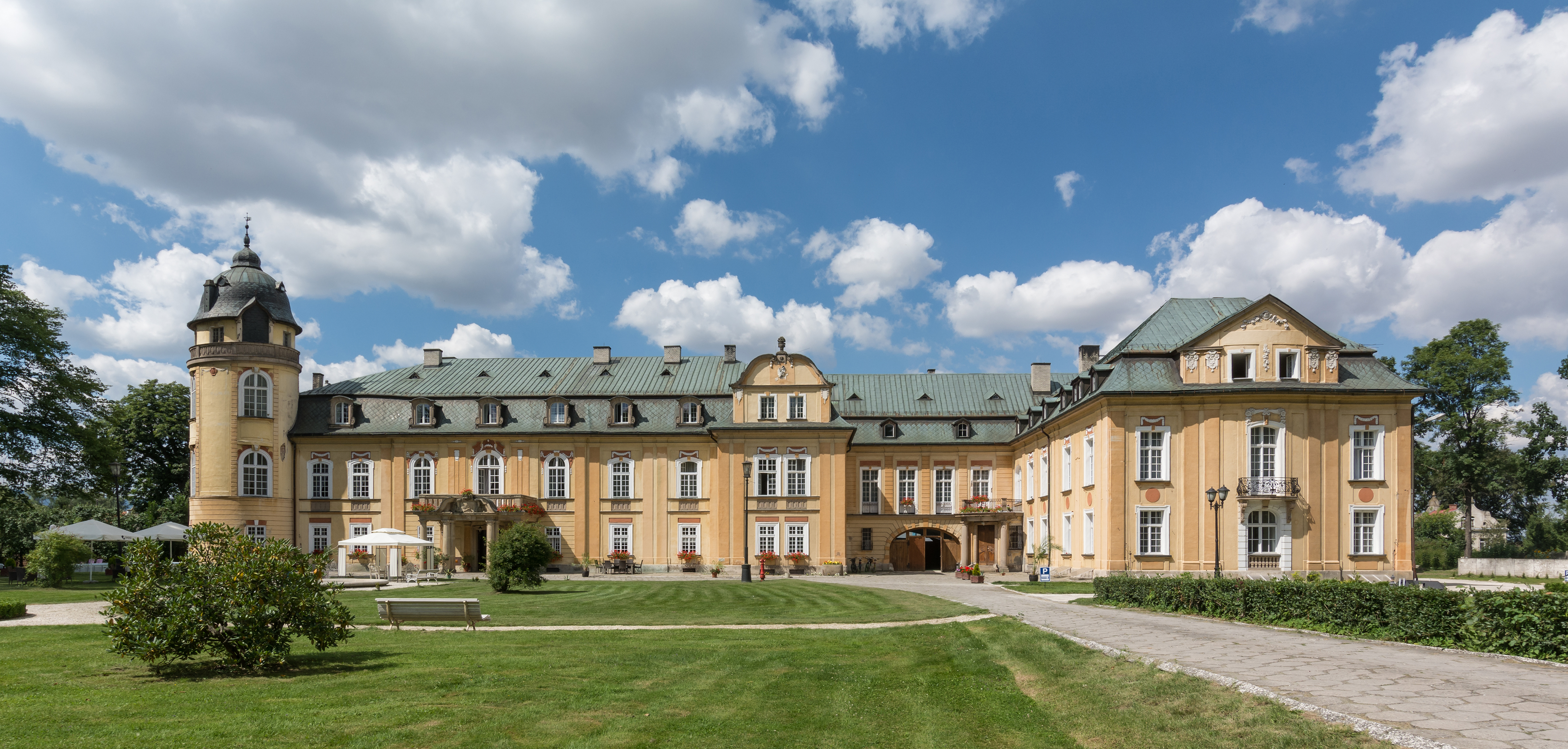 Żelazno, d. pałac von Löbbecke, 1797, 1869, 1908